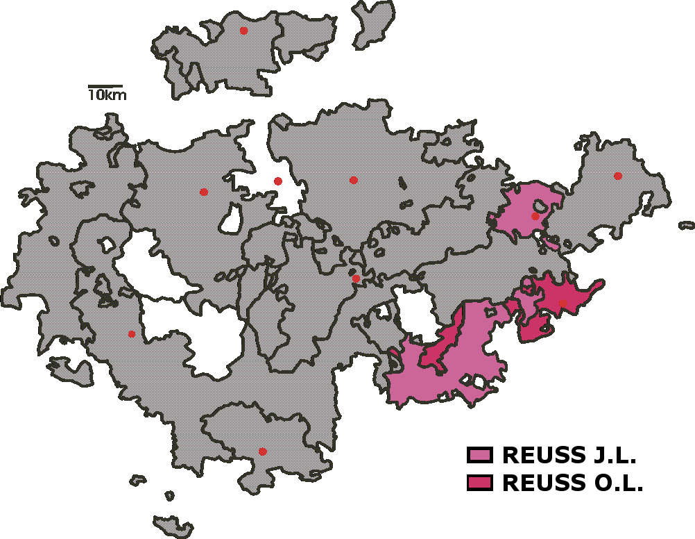 Vrijstaat Reuss.